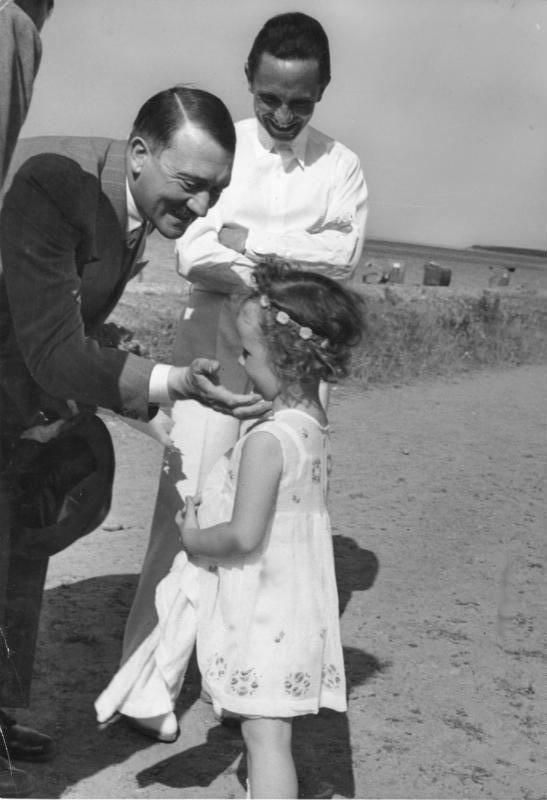 Adolf Hitler, Joseph Goebbels, Tochter Der Führer mit Dr. Goebbels und dessen Töchterchen in Heiligendamm [Heiligendamm.- Adolf Hitler mit Joseph Goebbels und dessen Tochter Helga am Strandweg, dem Kind die Wange tätschelnd] Abgebildete Personen: Goebbels, Joseph: Reichsminister für Volksaufklärung und Propaganda, Gauleiter Berlin, Deutschland Hitler, Adolf: Reichskanzler, Deutschland Helga Susanne: erste Tochter (wurde am 1. September 1932 geboren)